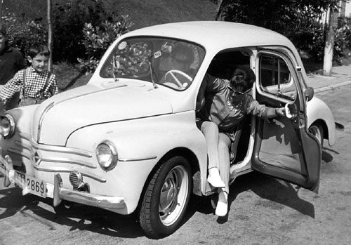 Beschreibung: Renault 4CV Quelle: Privatbesitz, fotografiert in den 60er Jahren Fotograf : Bleiglass, weitere Bilder von Bleiglass findest du hier ! nachbearbeitet in Photoshop Material: sw Lizenzstatus: GNU FDL